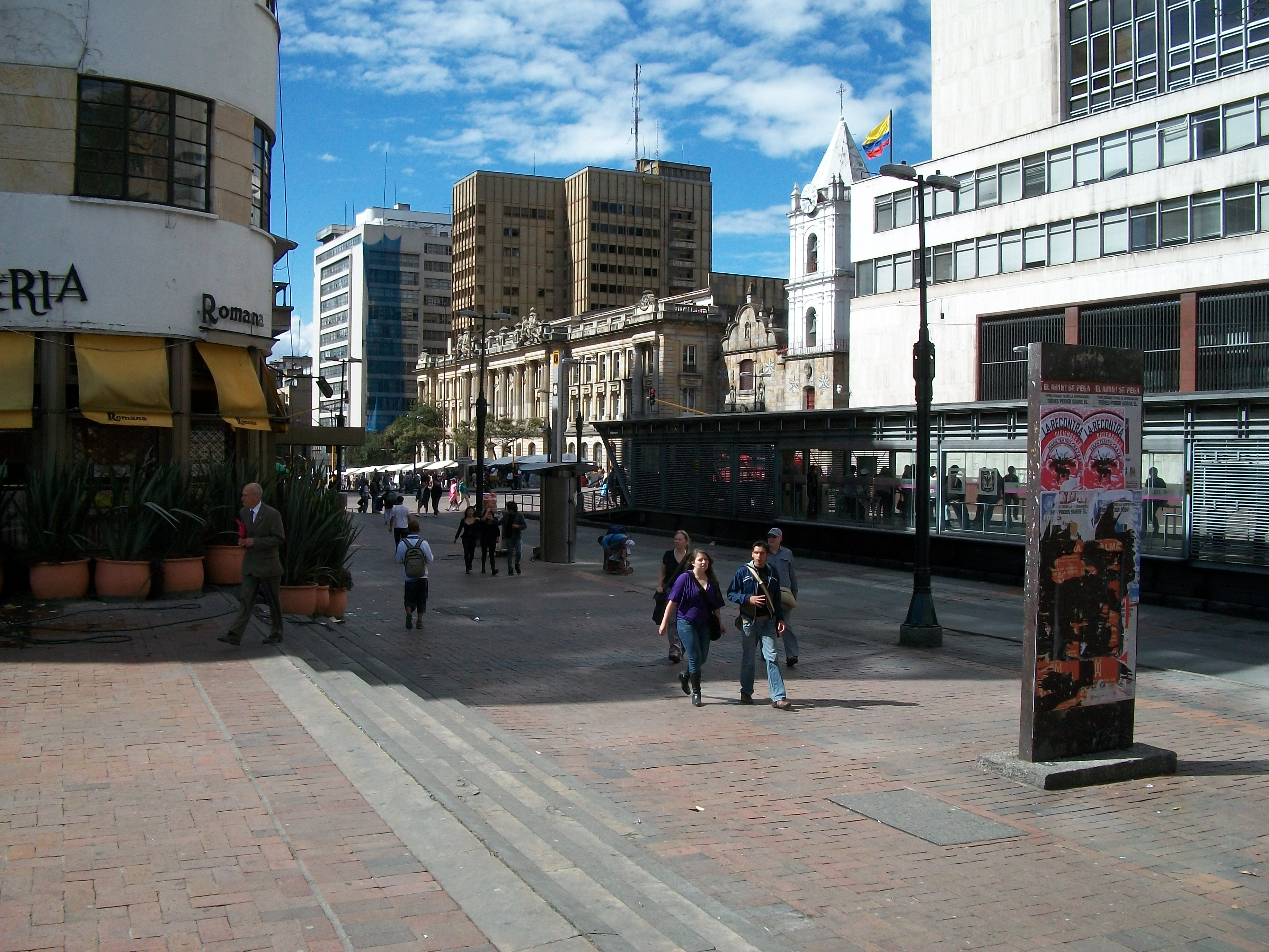 Carrera Séptima, Eje Ambiental Transmilenio